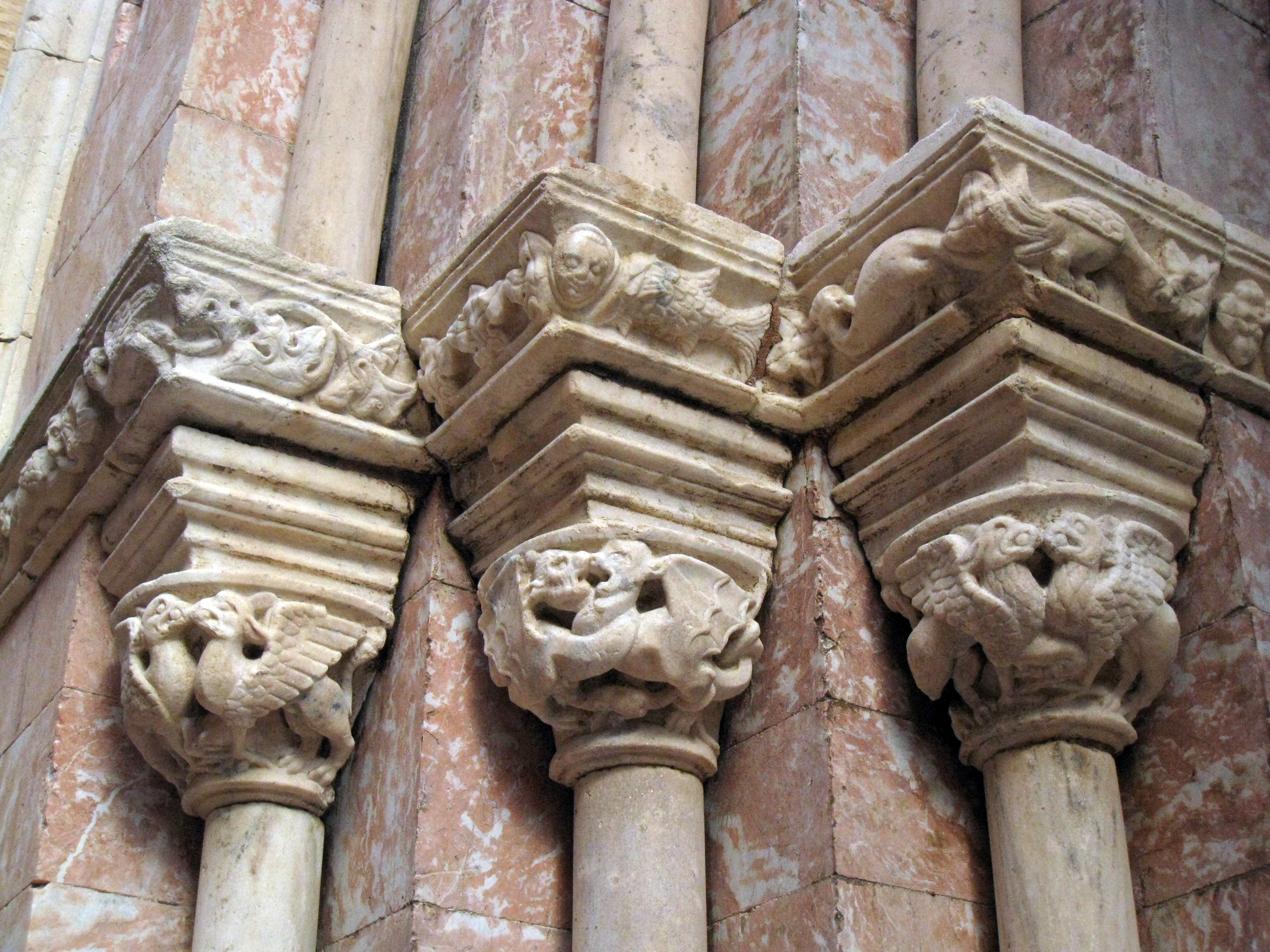 Església del Carme (Perpinyà), capitells de la portada, amb animals fantàstics .